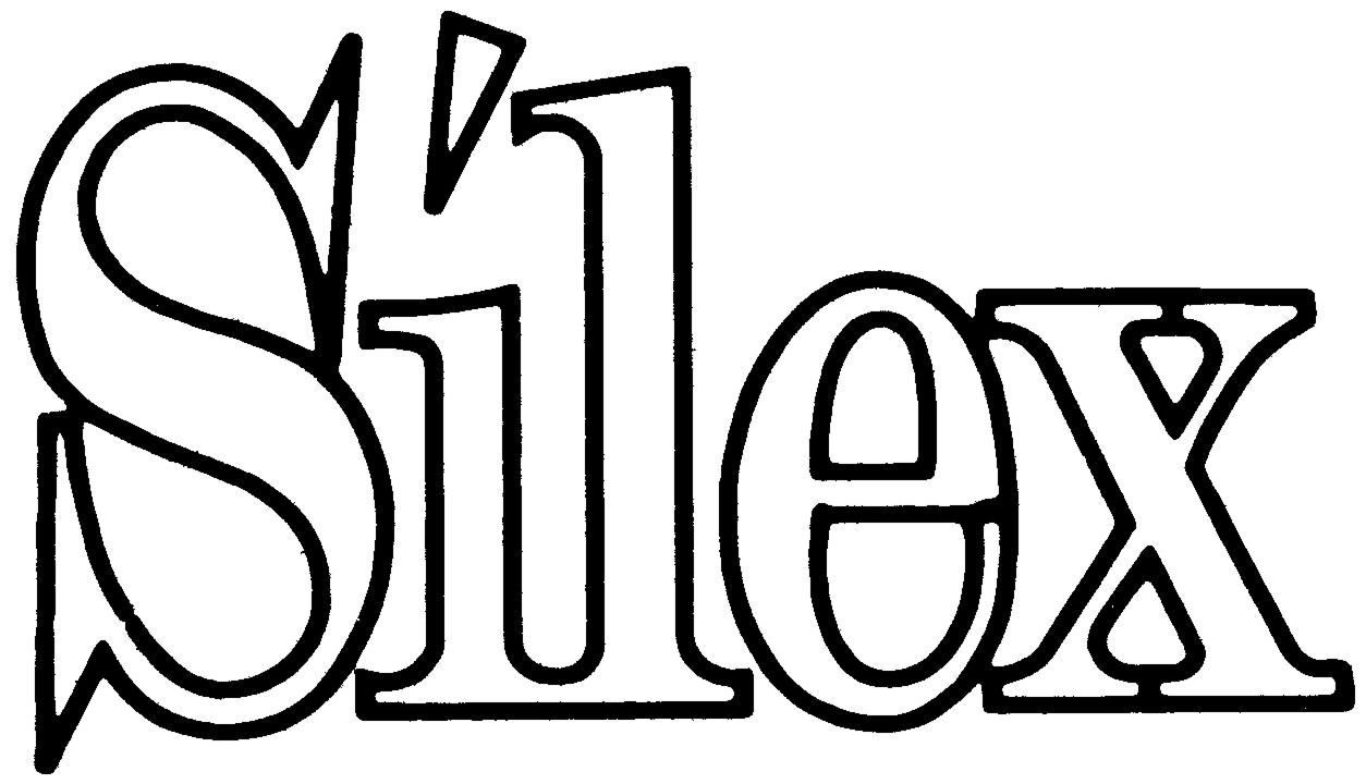 Logo de Silex ediciones